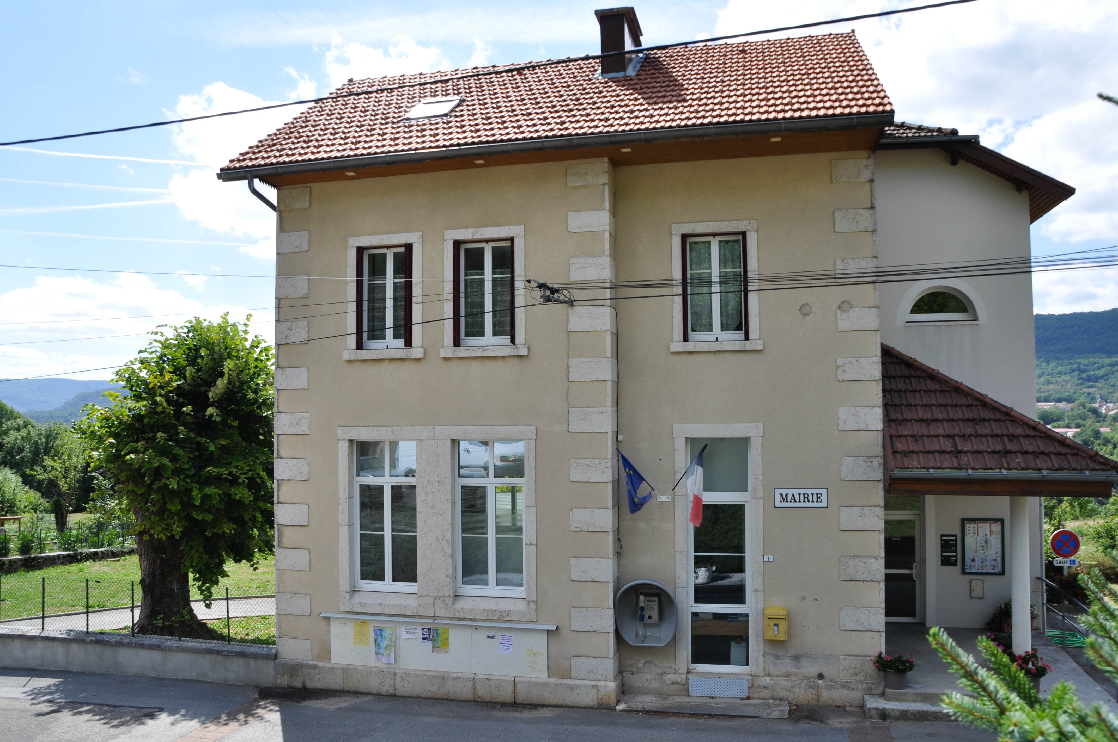 Mairie de Ponthoux, Jura